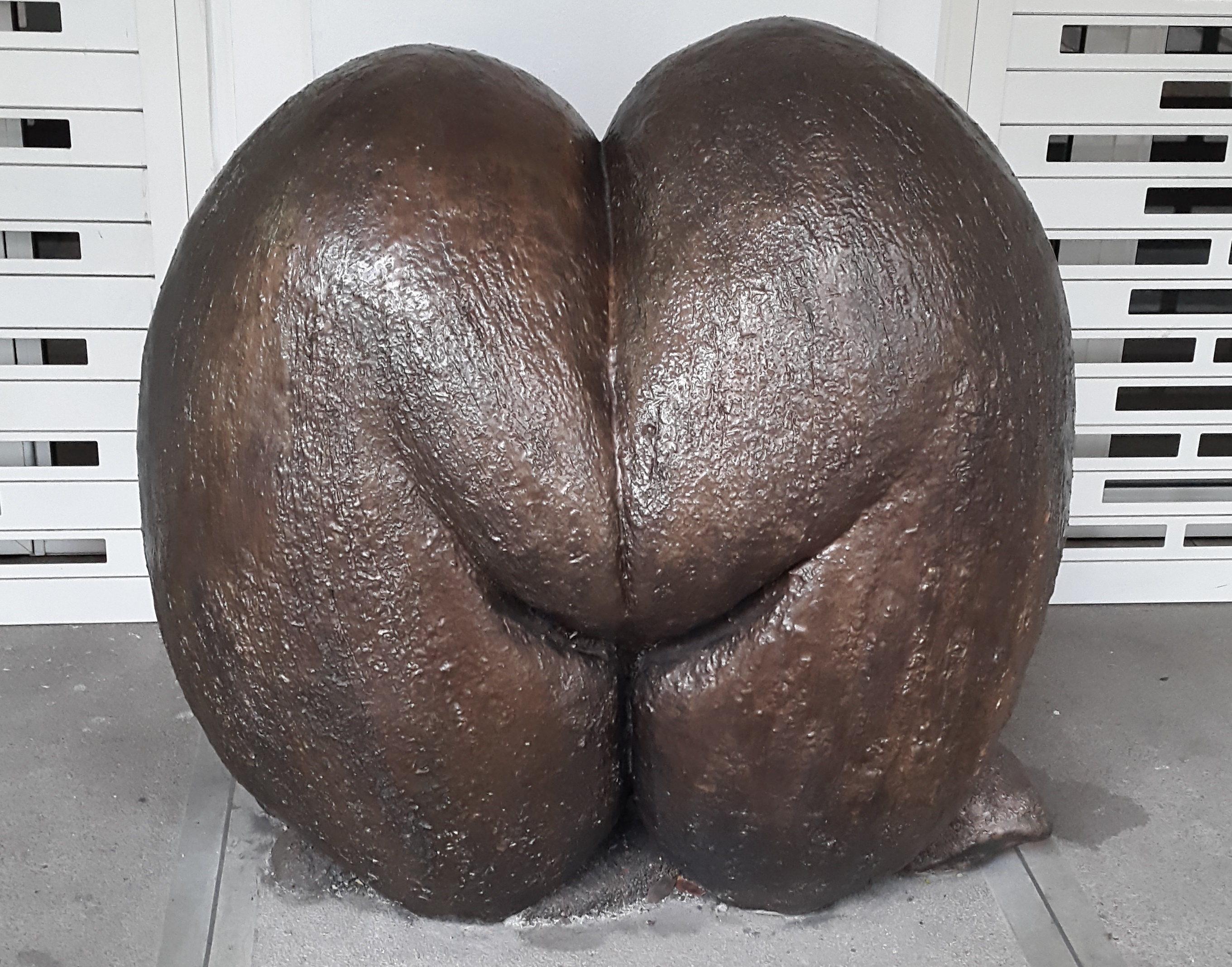 Coco-fesse, espèce protégée ne poussant que dans la vallée de Mai (île de Praslin, Seychelles).